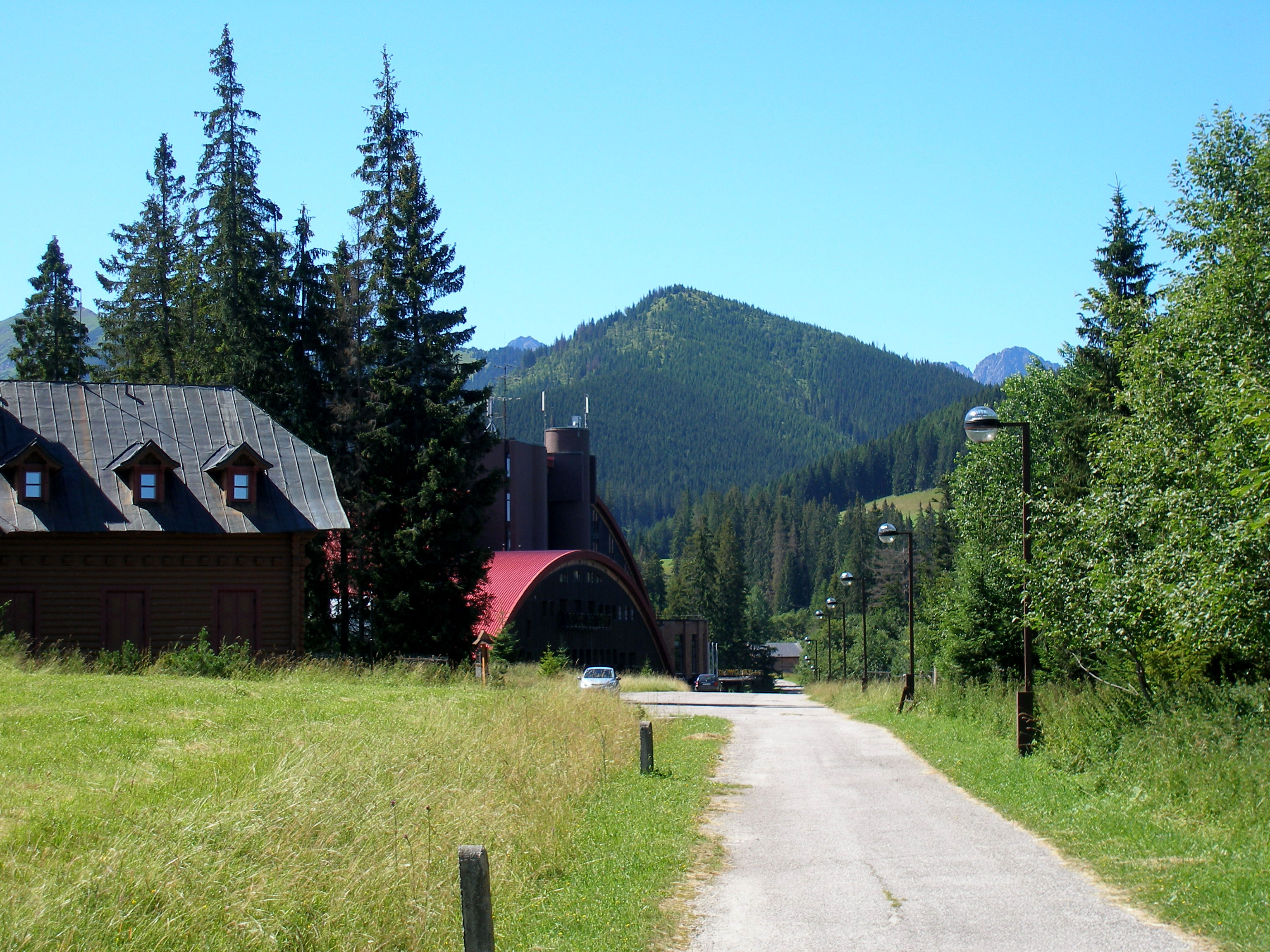 Podtatranská obec Tatranská Javorina.